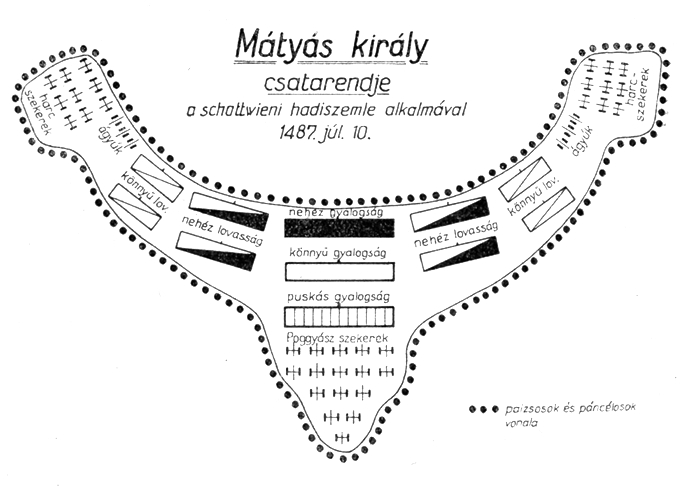 Mátyás király csatarendje a schottwieni hadiszemle alkalmával 1487. júl. 10. Bánlaky József: A magyar nemzet hadtörténelme